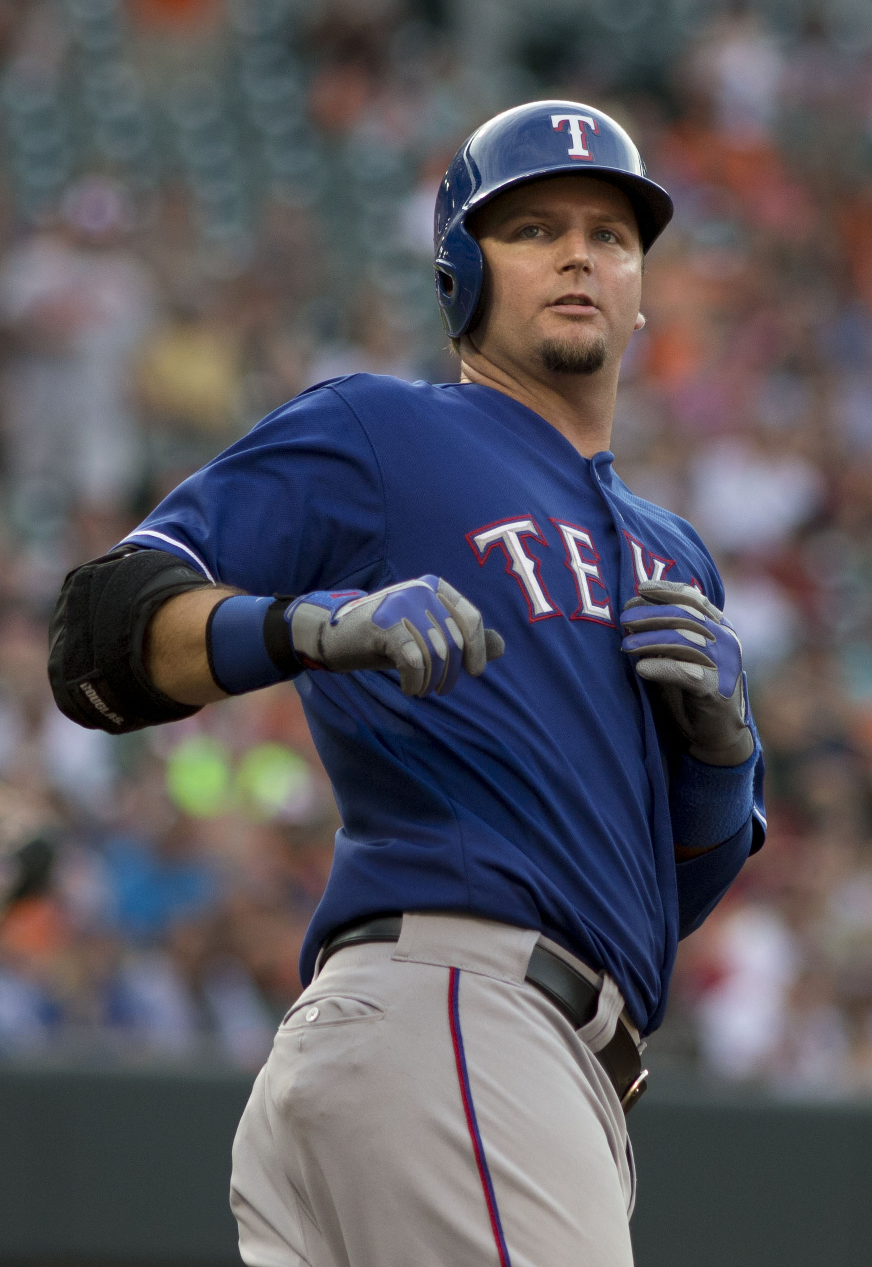 A. J. Pierzynski